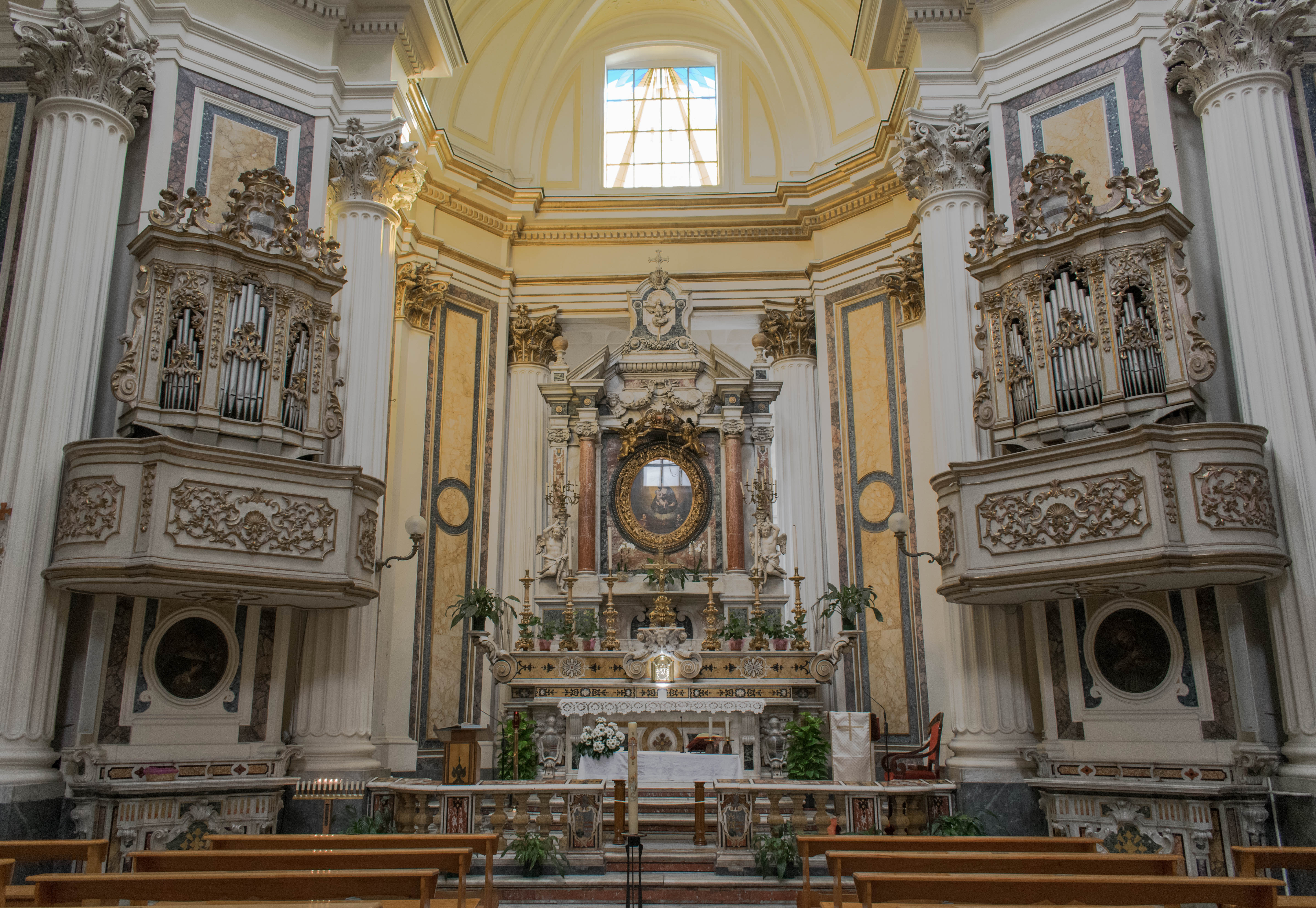 Altare maggiore, Santa Maria dell'Aiuto, Napoli